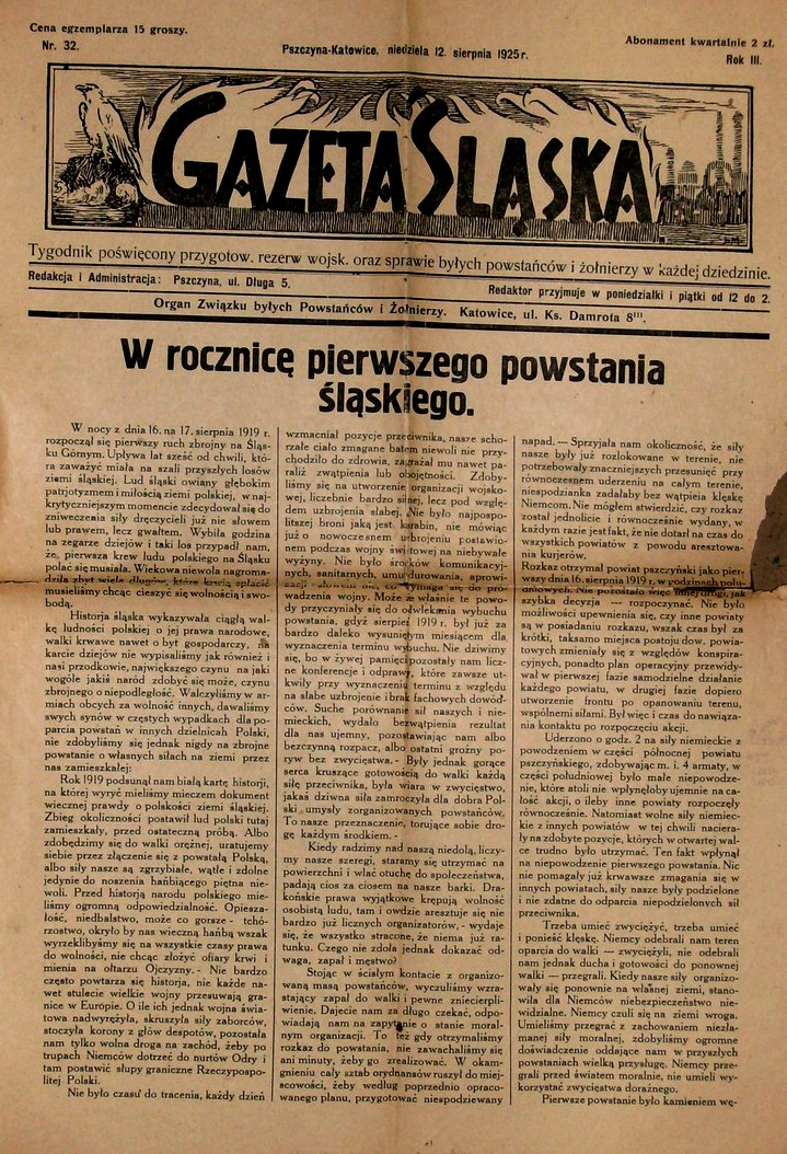 Gazeta Śląska z 1925, nr 32, s. 1